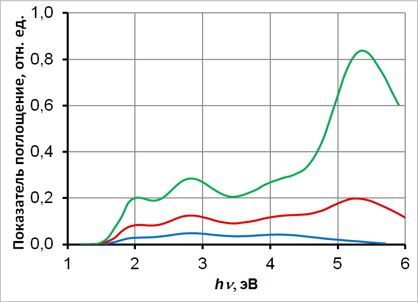 Спектры поглощения центров окраски в натриево-силикатном стекле